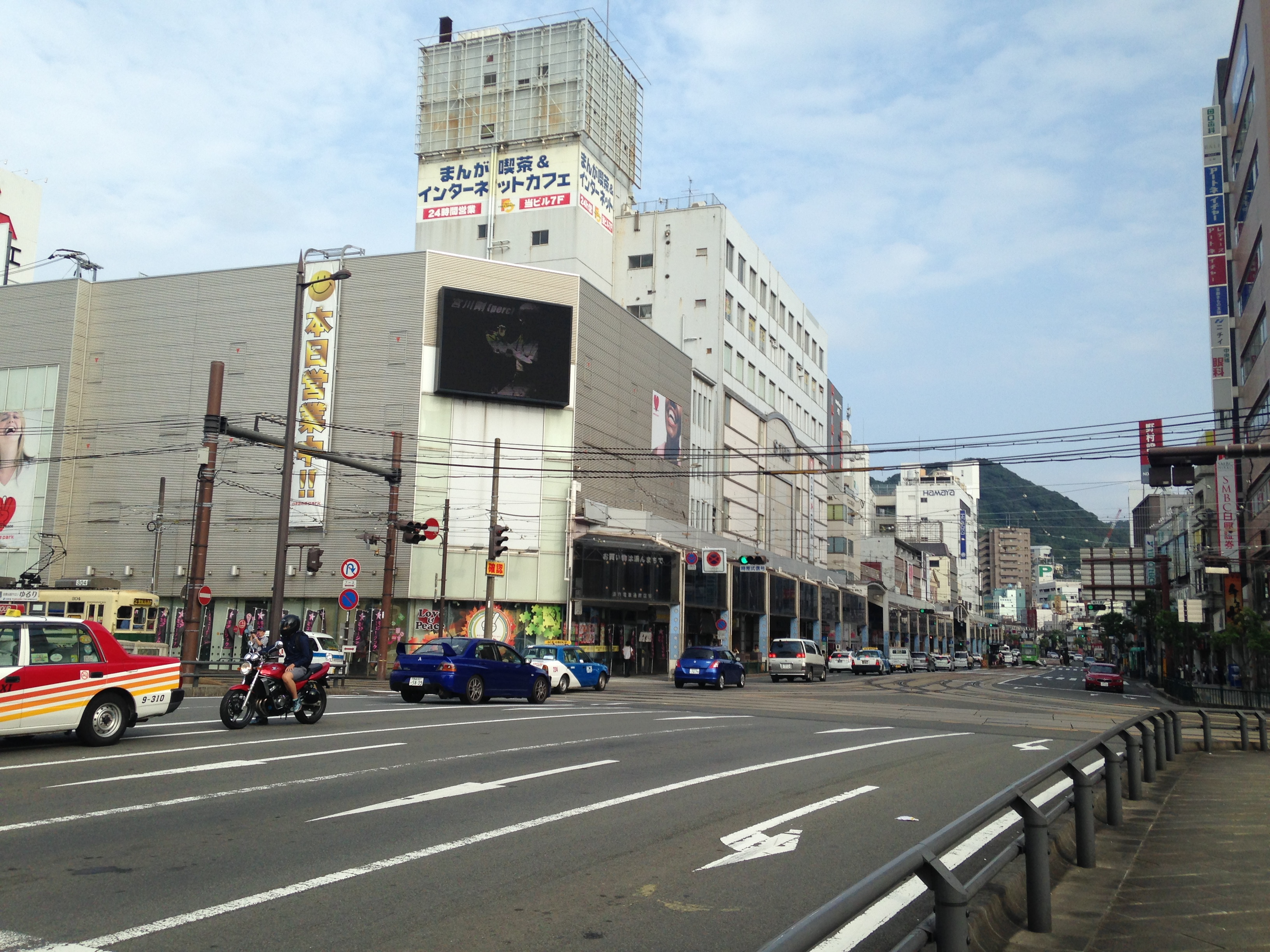 中央橋より東側を望む